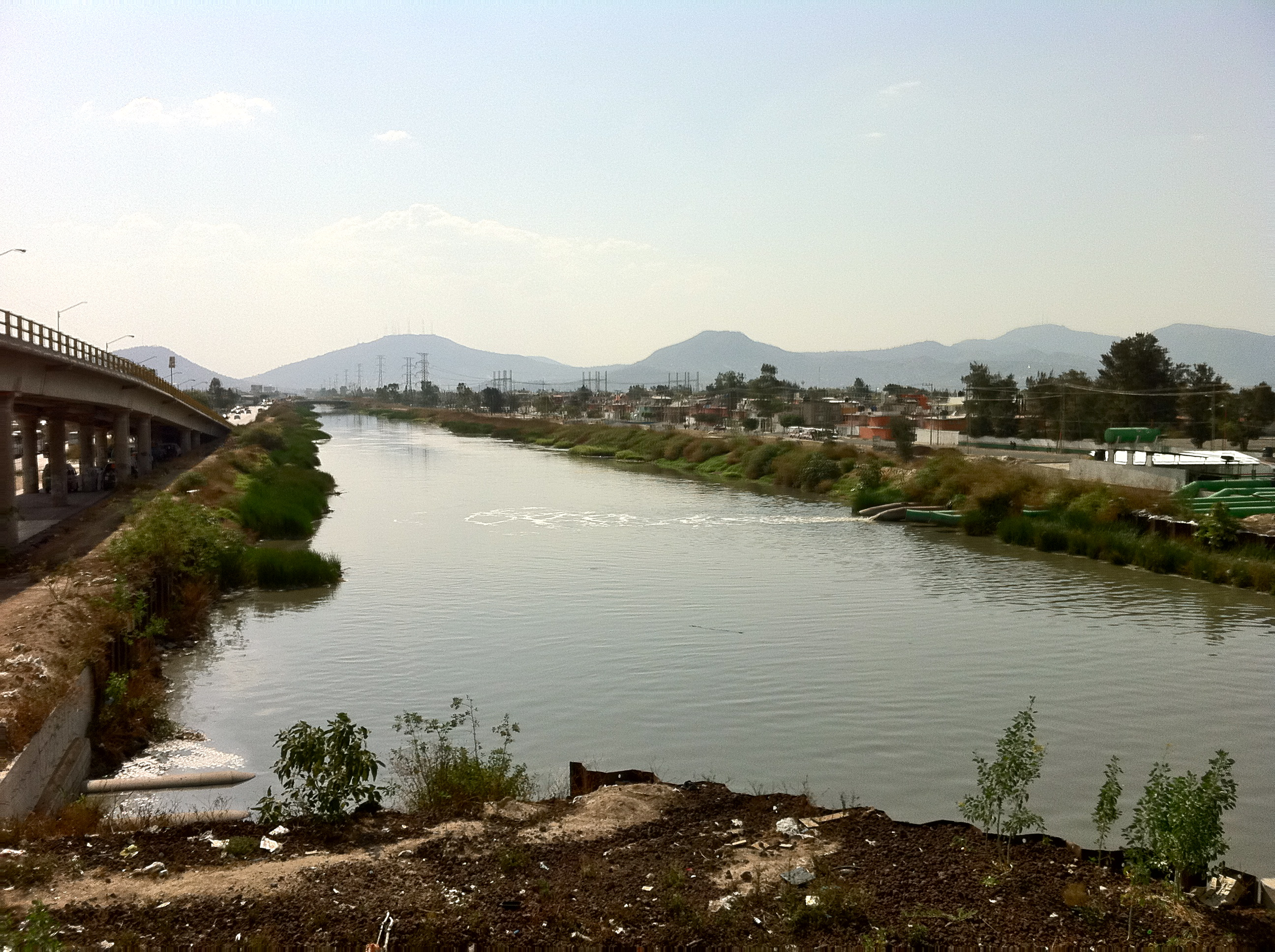 "Río de los Remedios" en la estación del metro Río de los Remedios